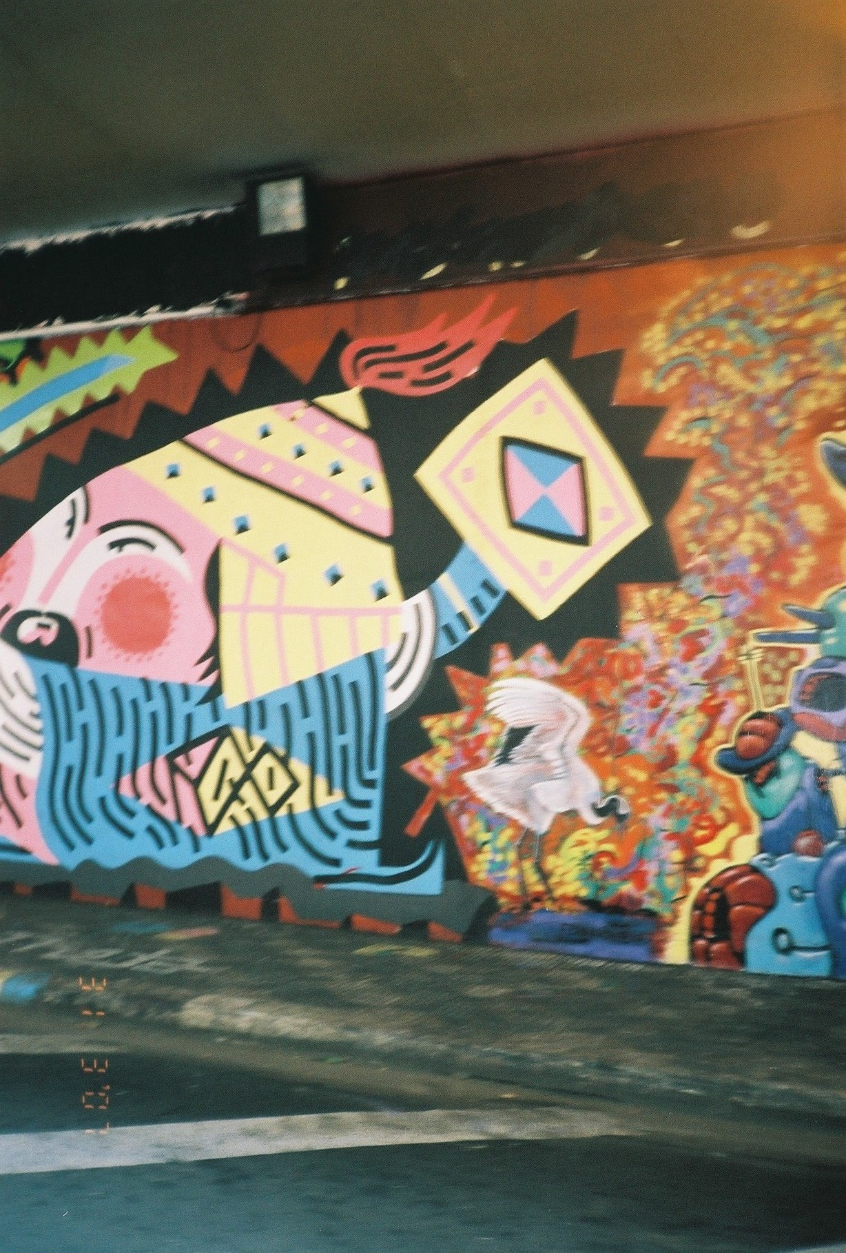 Grafitismo na interligação das avenidas Paulista e Dr. Arnaldo, em São Paulo, Brasil